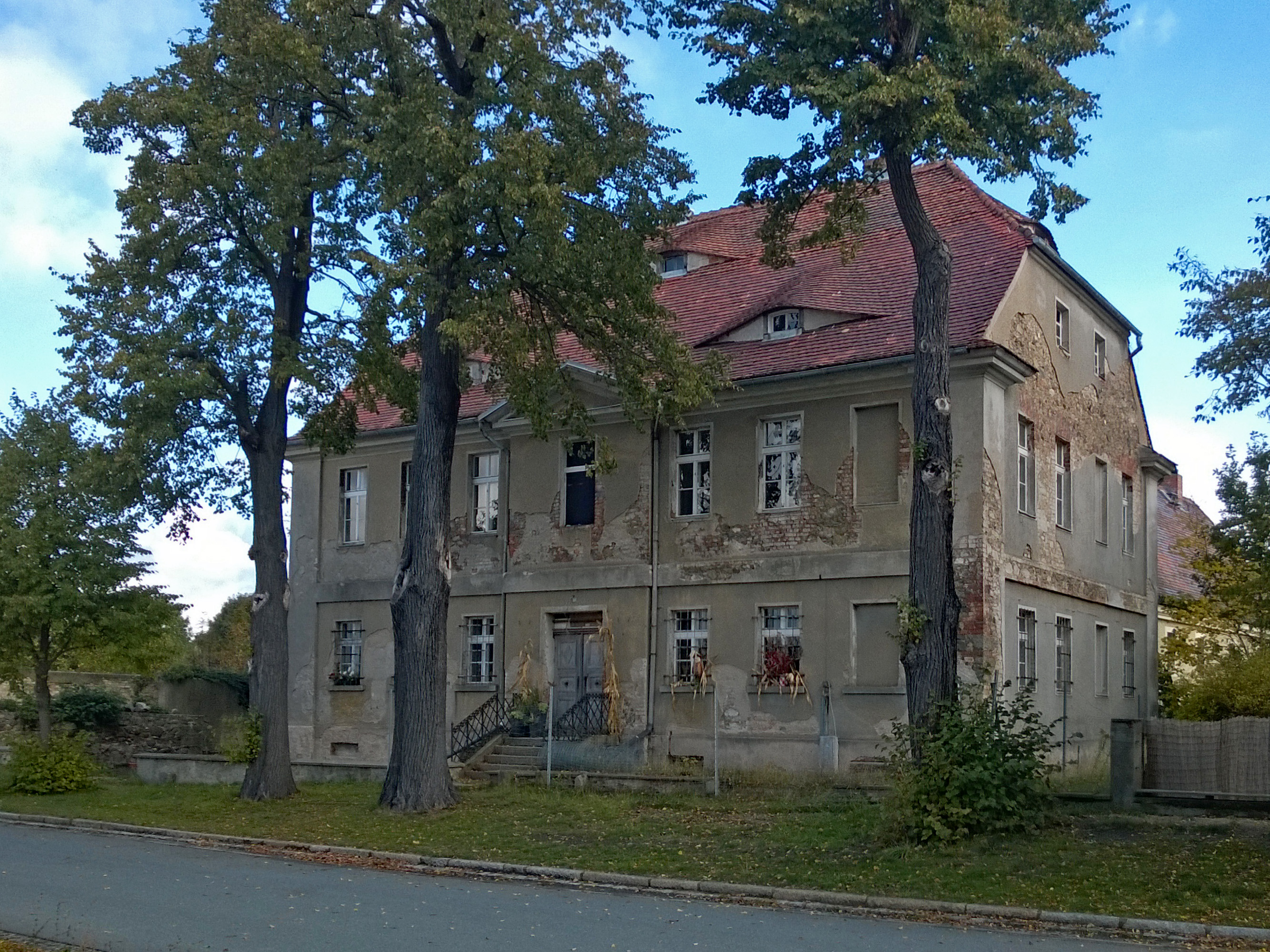 ehem. Pfarrhaus in Deutsch-Ossig